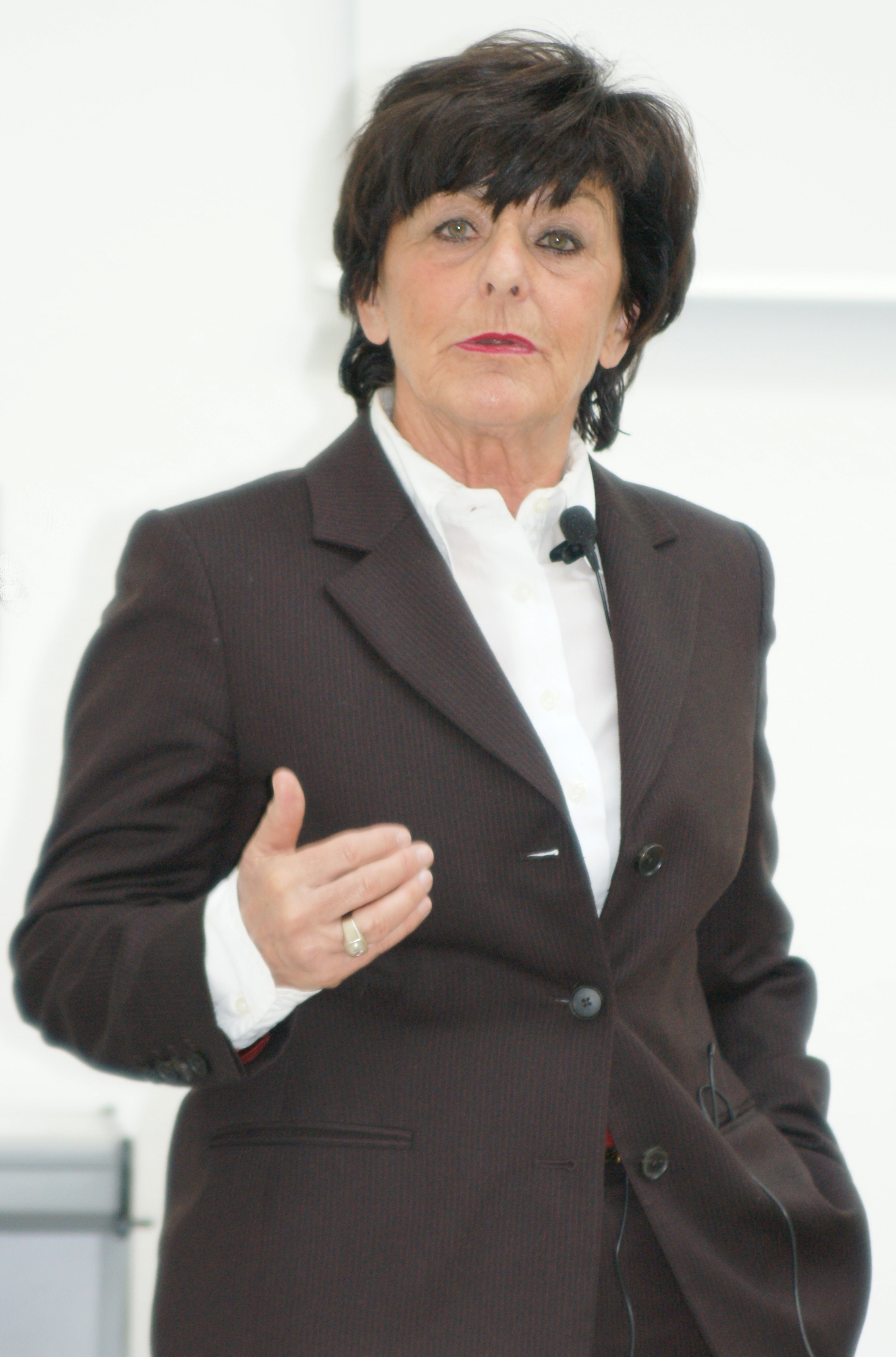 Dörthe Jung (2010)